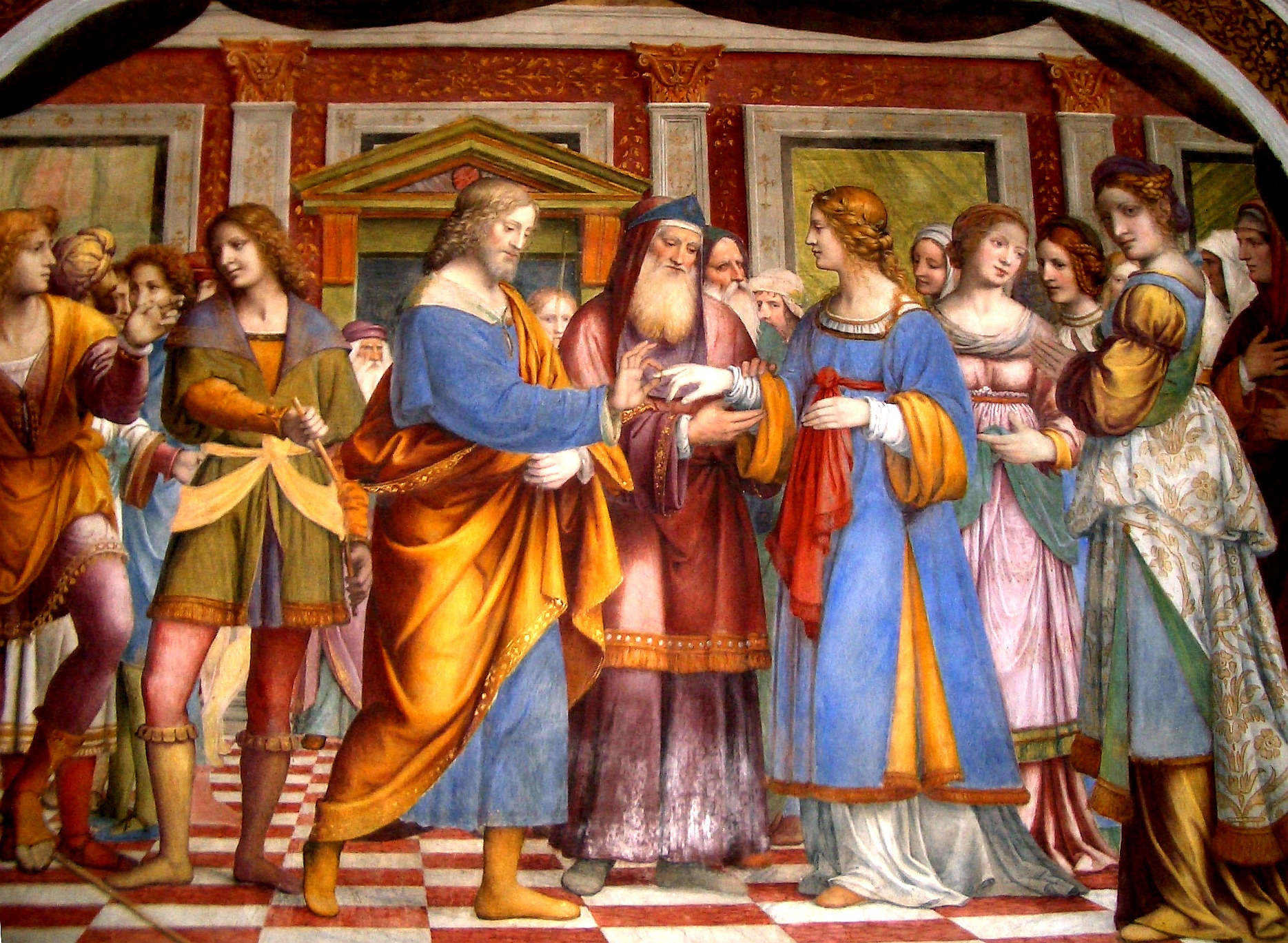 Bernardino Luini, The Engagement of Virgin Mary, Santuario della Beata Vergine dei Miracoli, Saronno (Varese), Italy